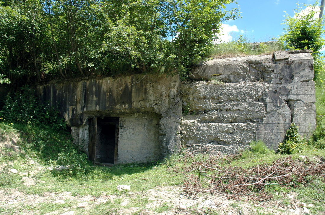 Árpád Line, Verchnia Hrabivnytsia